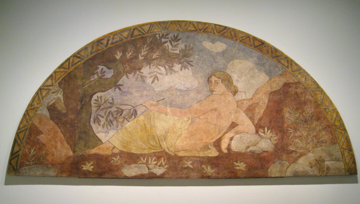 "La Terra" o "L'Edat d'Or de la humanitat", de Joaquim Torres-Garcia. Fresc mural traspassat (1915). Palau de la Generalitat de Catalunya, Sala Torres-Garcia